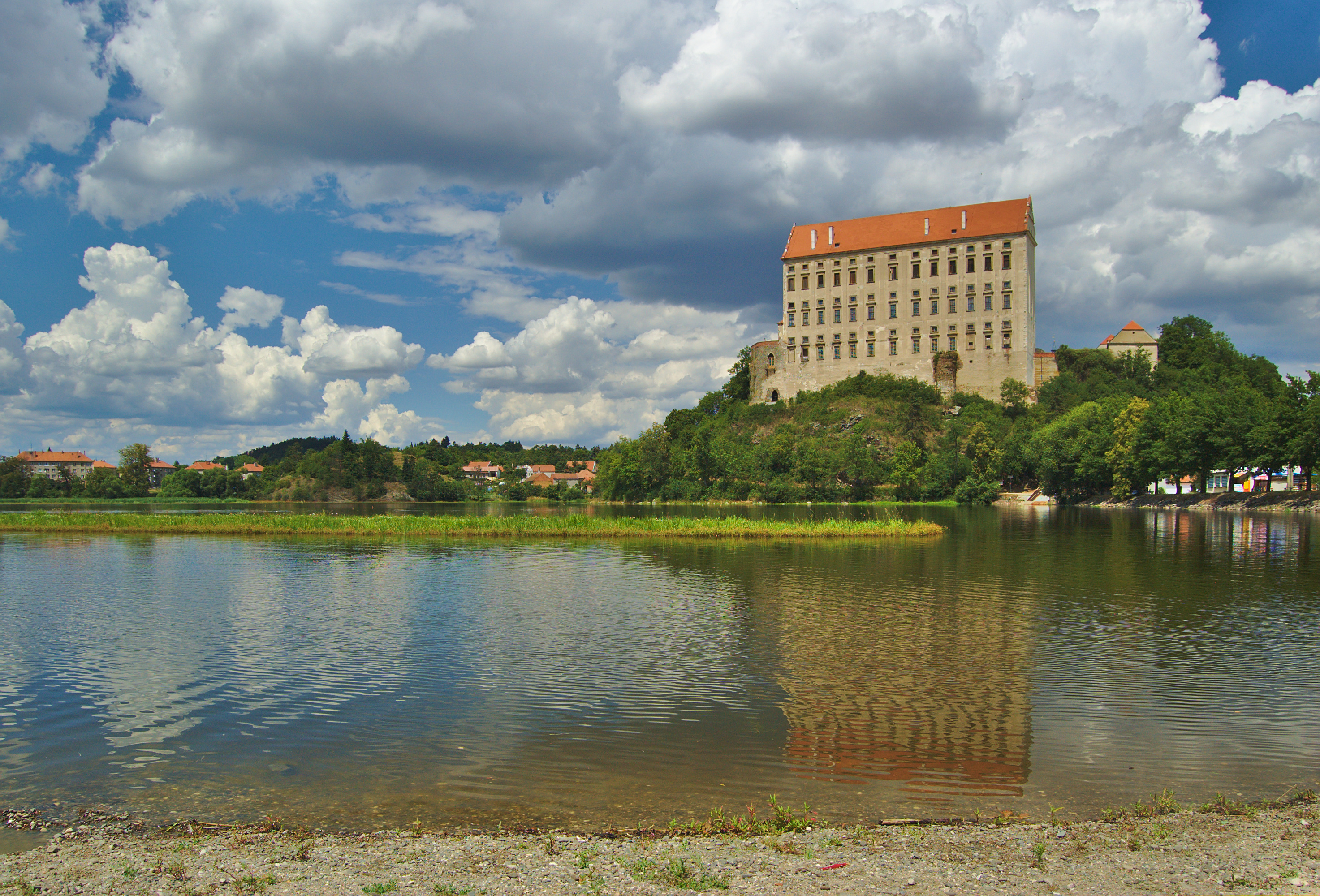 Zámek Plumlov, okres Prostějov